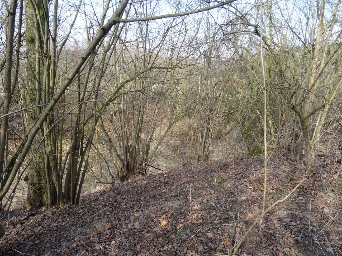 Grodzisko Kamieniec nad Wisłą we wsi Czarnowo k. Bydgoszczy